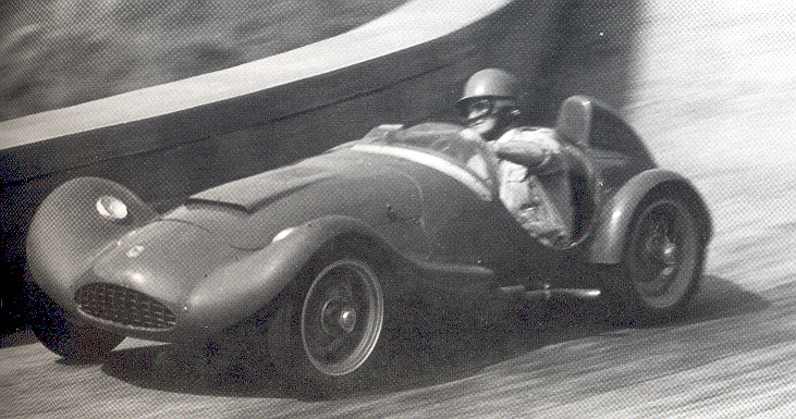 ing. h. c. Ilario Bandini bandini 750 ss tratta da Libro: Bandini (storia della vita e automobili di Ilario Bandini)